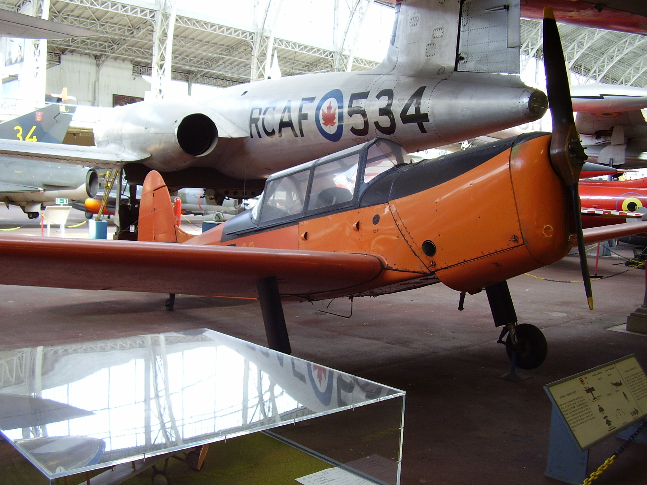 Royal Military Museum Brussels, Musée Royal de l'Armée, Koninklijk Museum van het Leger en de Krijgsgeschiedenis